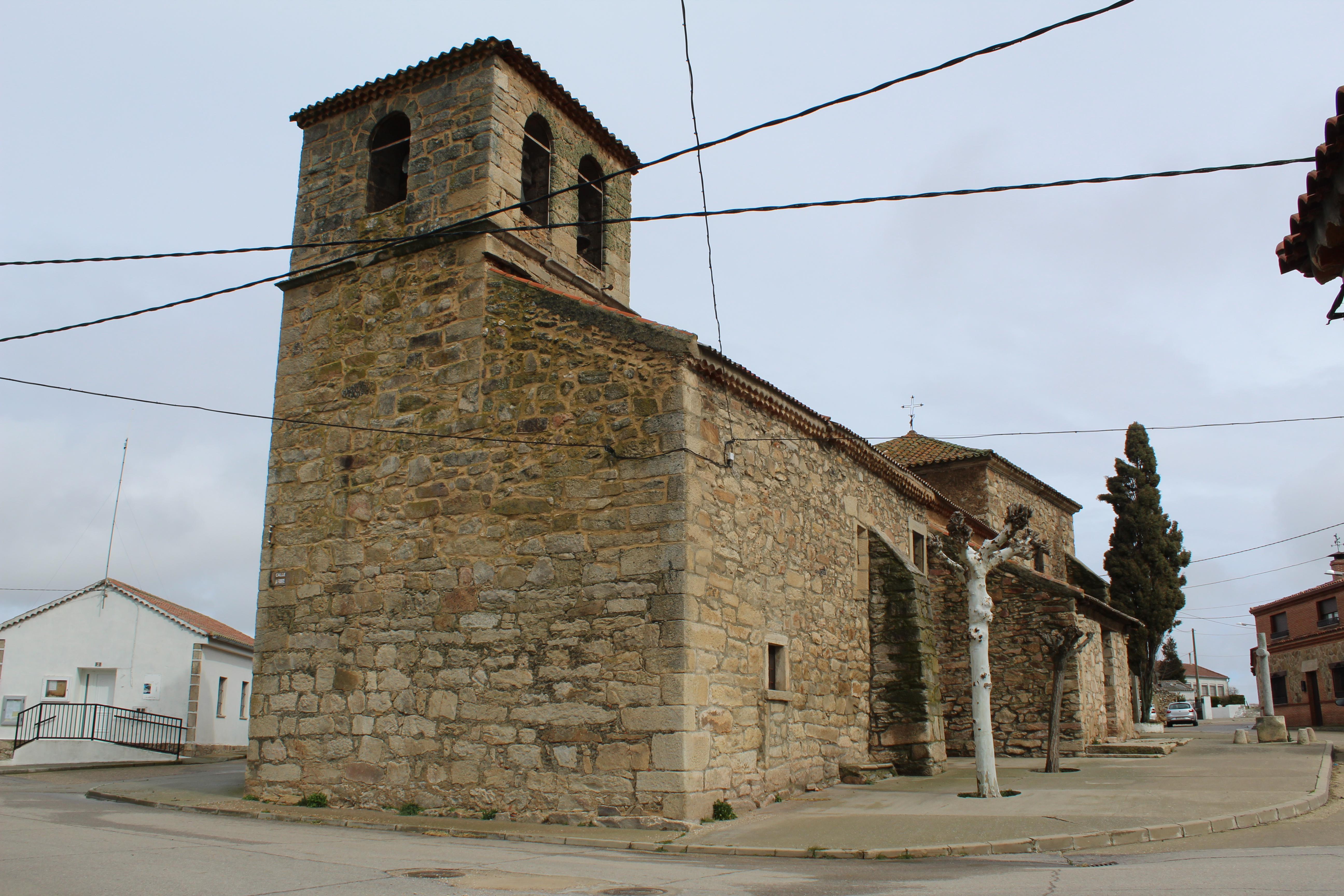 Iglesia de Martinamor, vista de la torre y los contrafuertes laterales.